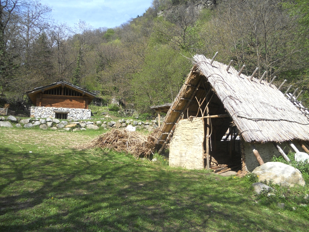 Area didattica Foppe di Nadro con ricostruzione di capanna neolitica e abitazione dell'età del ferro. Riserva naturale Incisioni Rupestri di Ceto, Cimbergo e Paspardo. Nadro, Arte rupestre della Valle Camonica